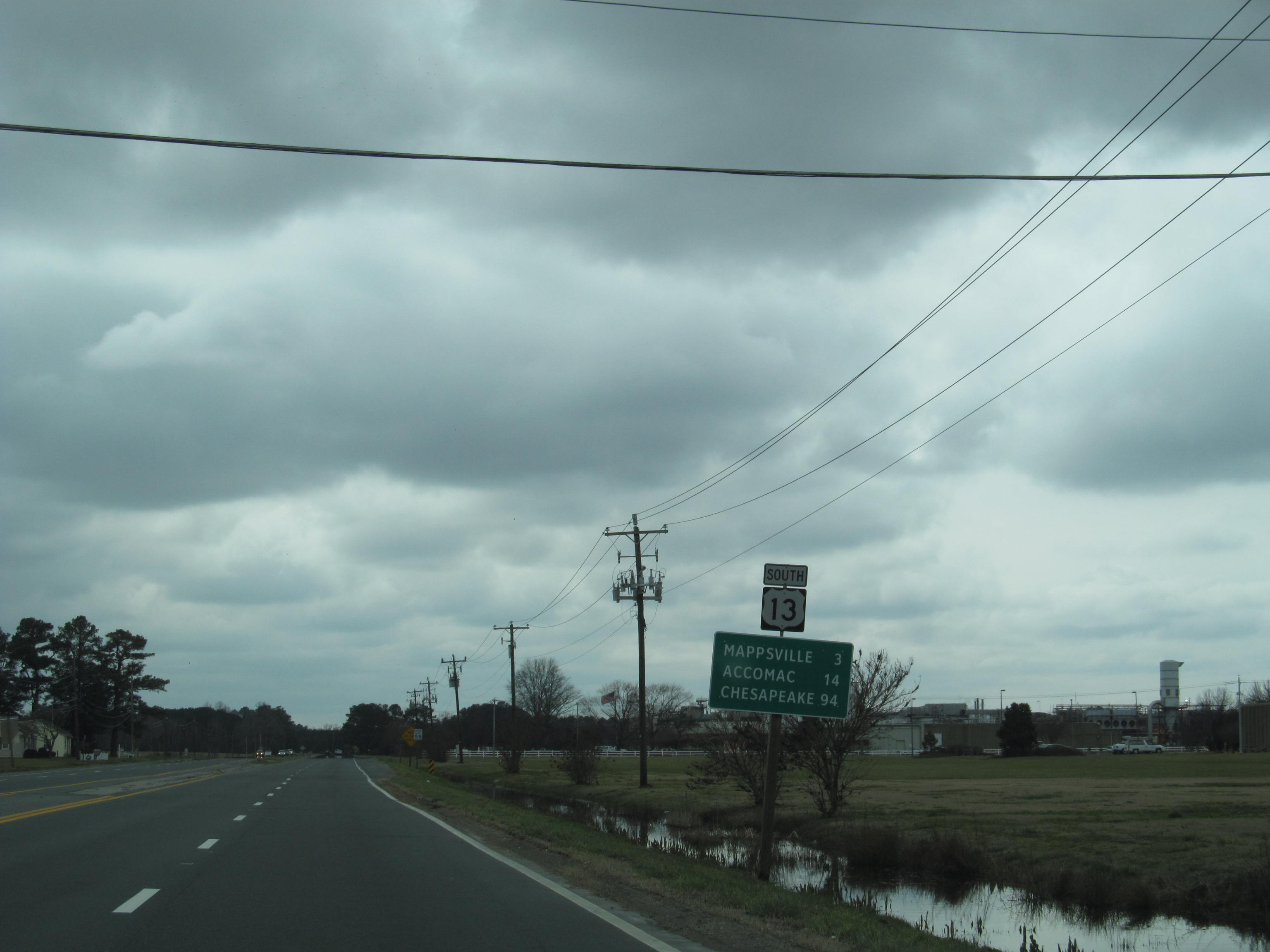 US Route 13 - Virginia